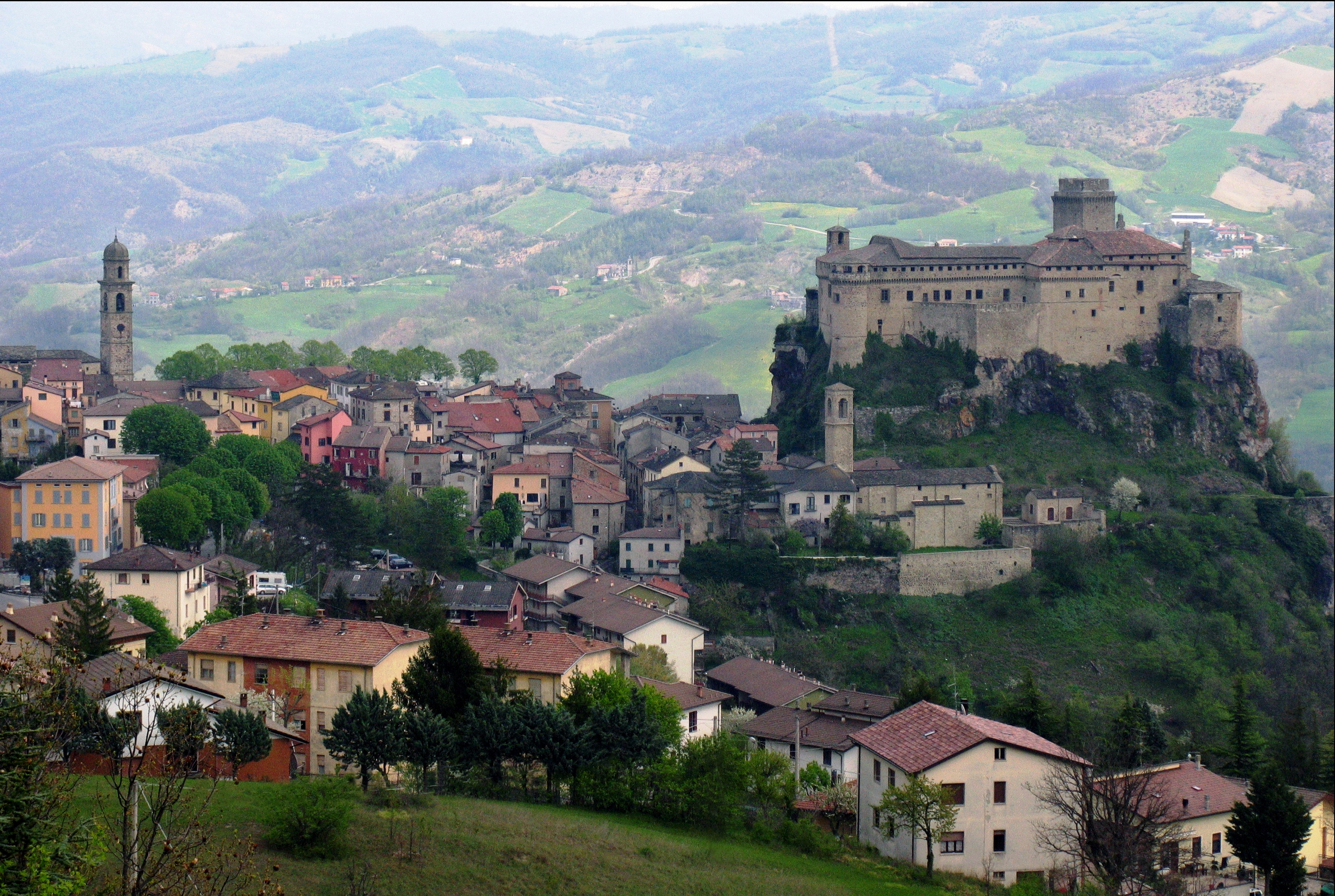 Veduta di Bardi col Castello dei Landi.